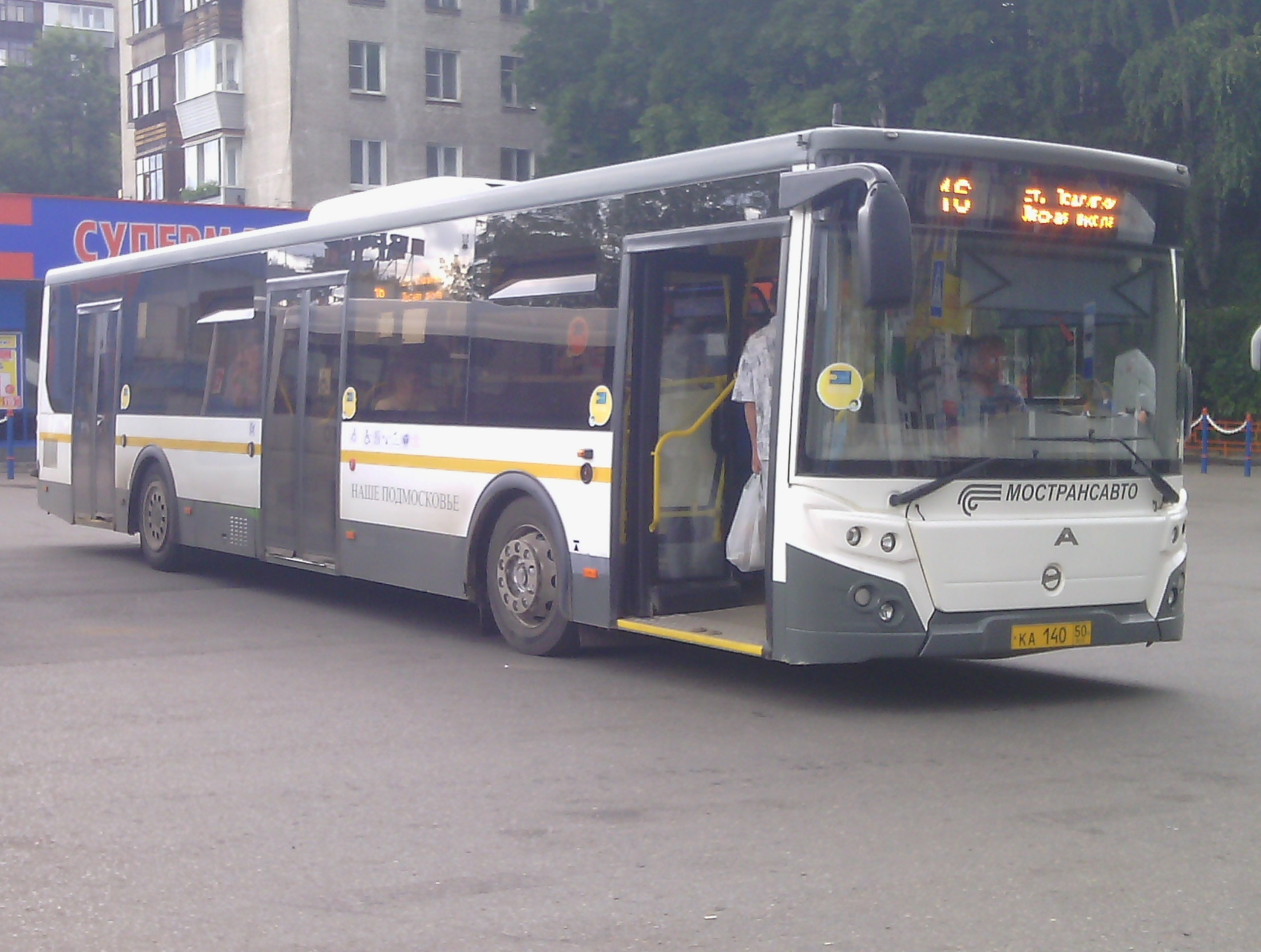 Автобус 16 на станции Подлипки